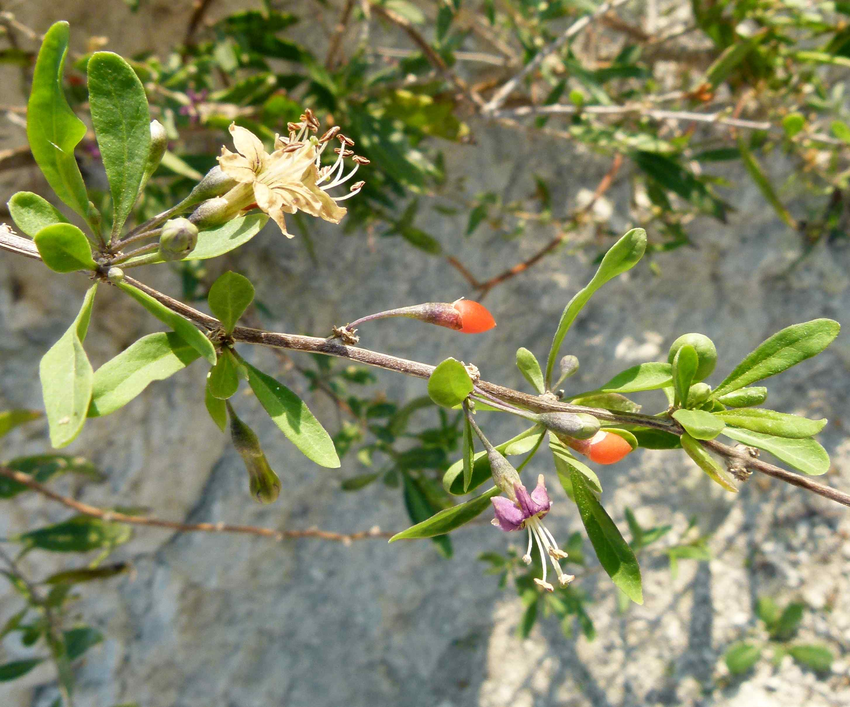 Lycium barbarum, sur les falaises crayeuses de la Gironde, rive droite (17)